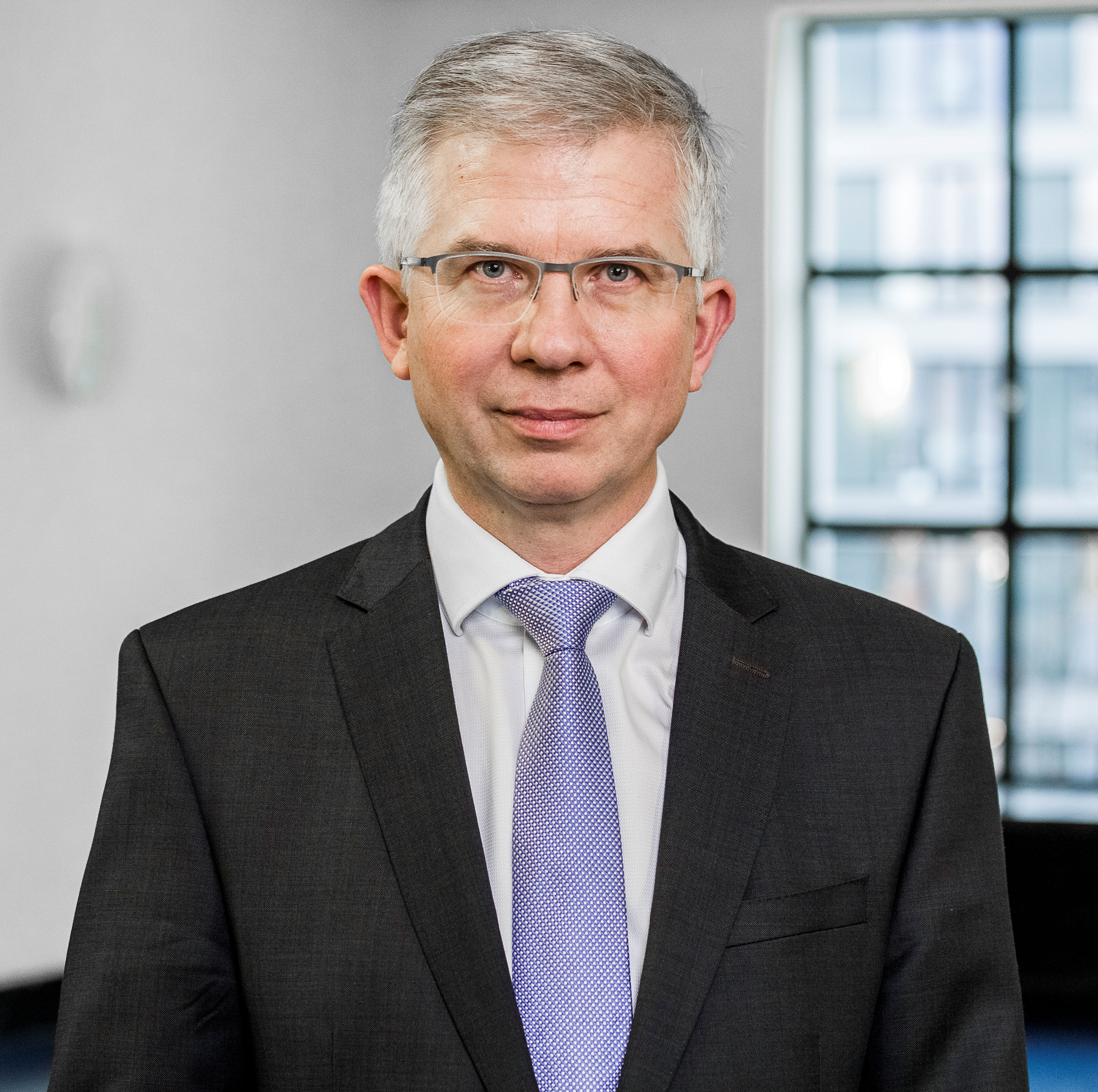 Prof. Dr. Andrew Ullmann, MdB